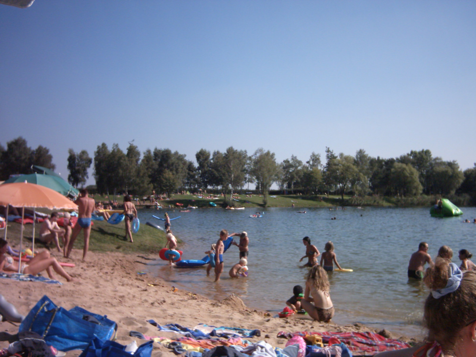 Badesse in Mainhausen-Mainflingen